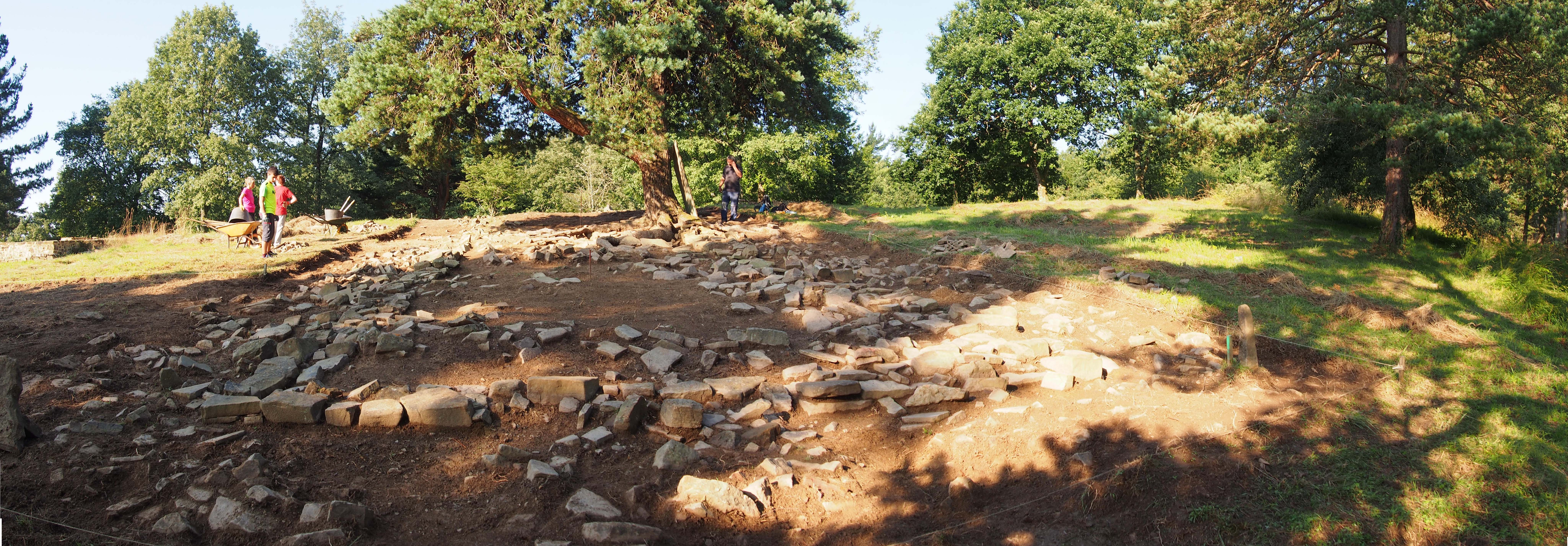 Elexazar aztenatategiko mendebaldean dagoen laukiluze oinplanta duen eraikuntza, antza, gela bakarraz osatutako. Errenkada bakarra eta alboetan, eroritako harriak geratu dira.